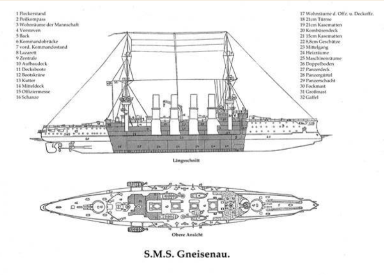 Längsschnitt und obere Ansicht der SMS Gneisenau (1906)